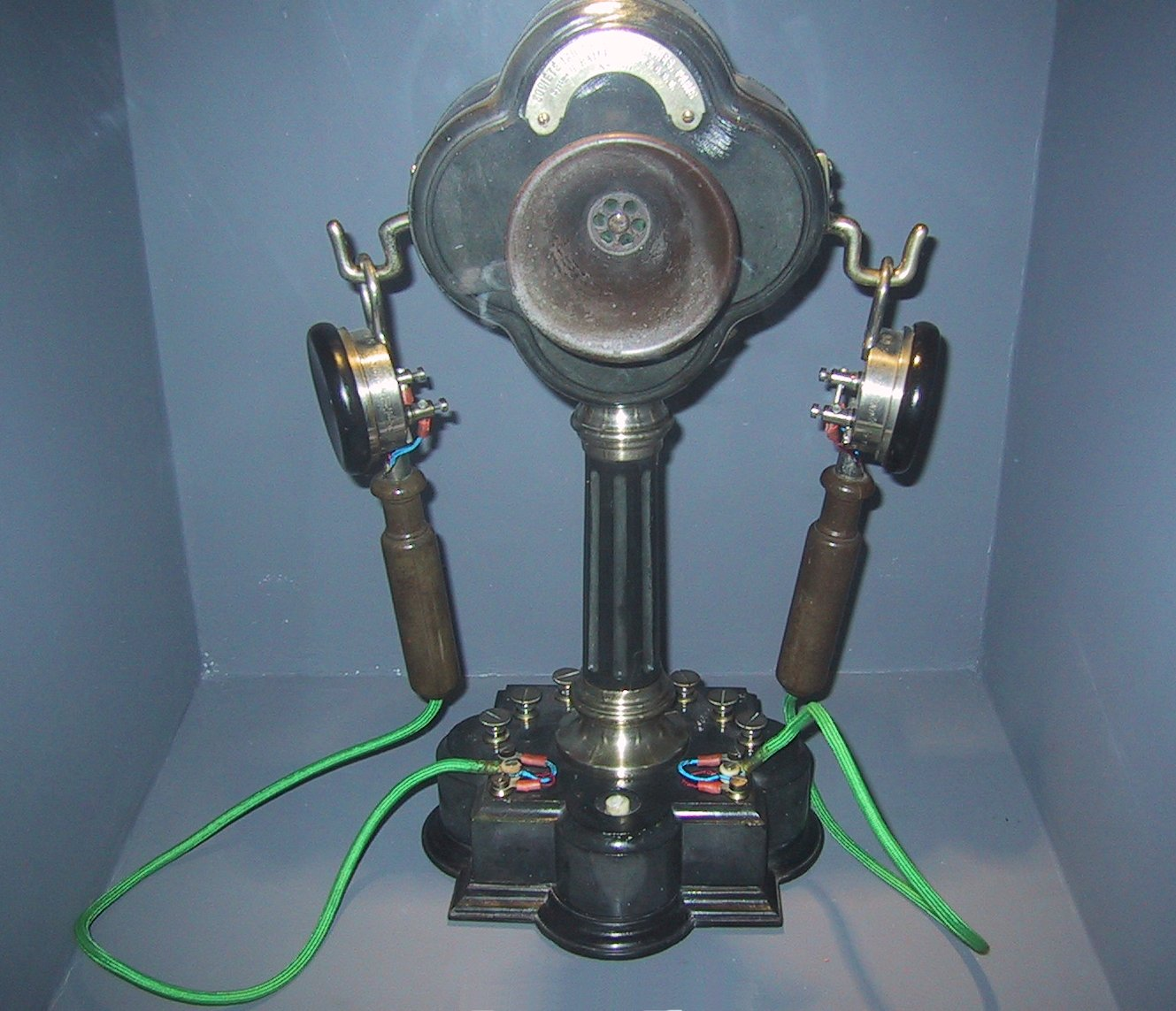 Société Industrielle du Téléphone (1892), collection historique de France Télécom, musée des télécommunications de Pleumeur-Bodou, France.